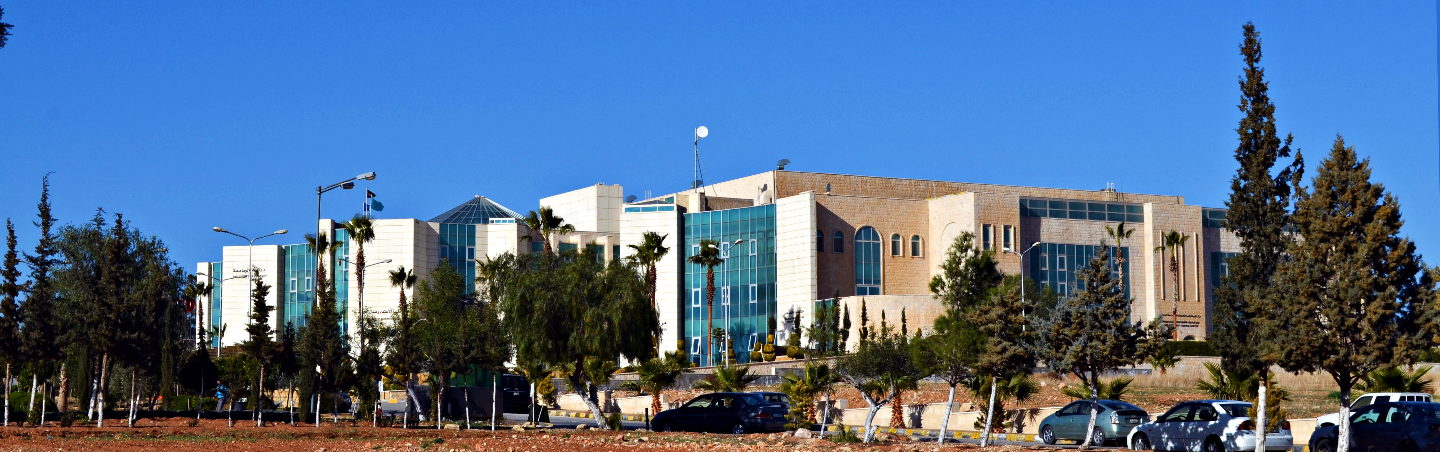 جامعة الزرقاء، عمّان